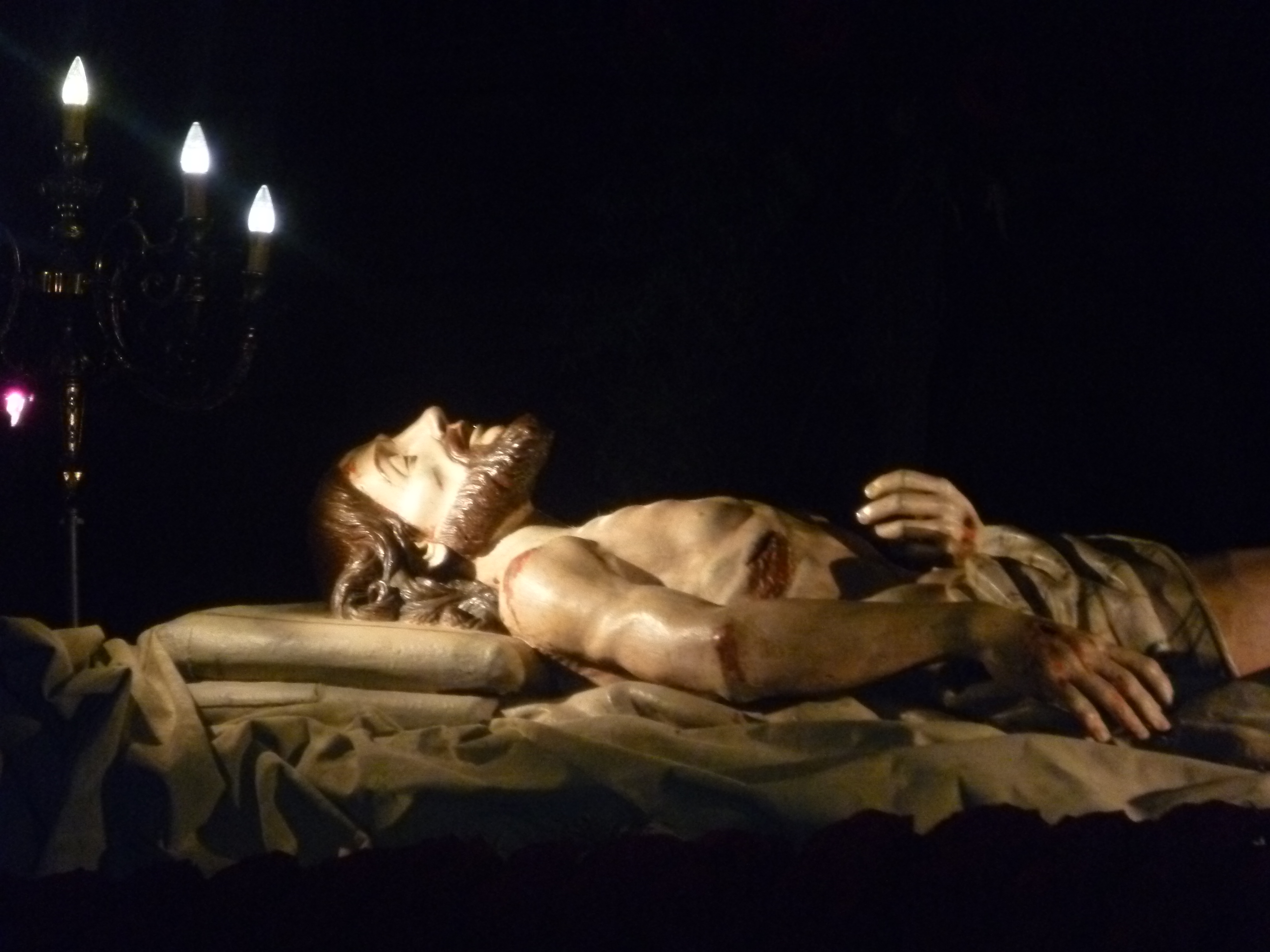 Processione dei Misteri, Ruvo di Puglia